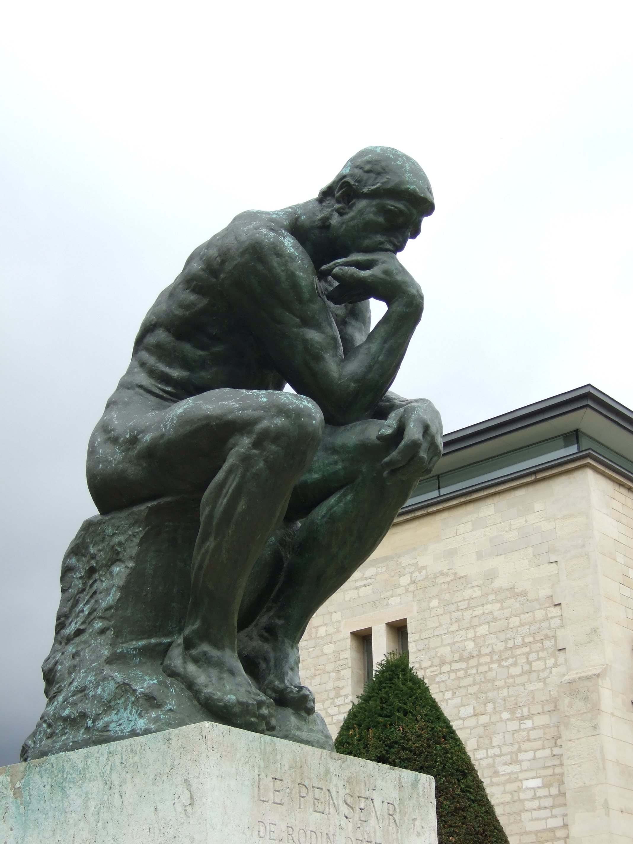 El pensador. Museo Rodin Paris